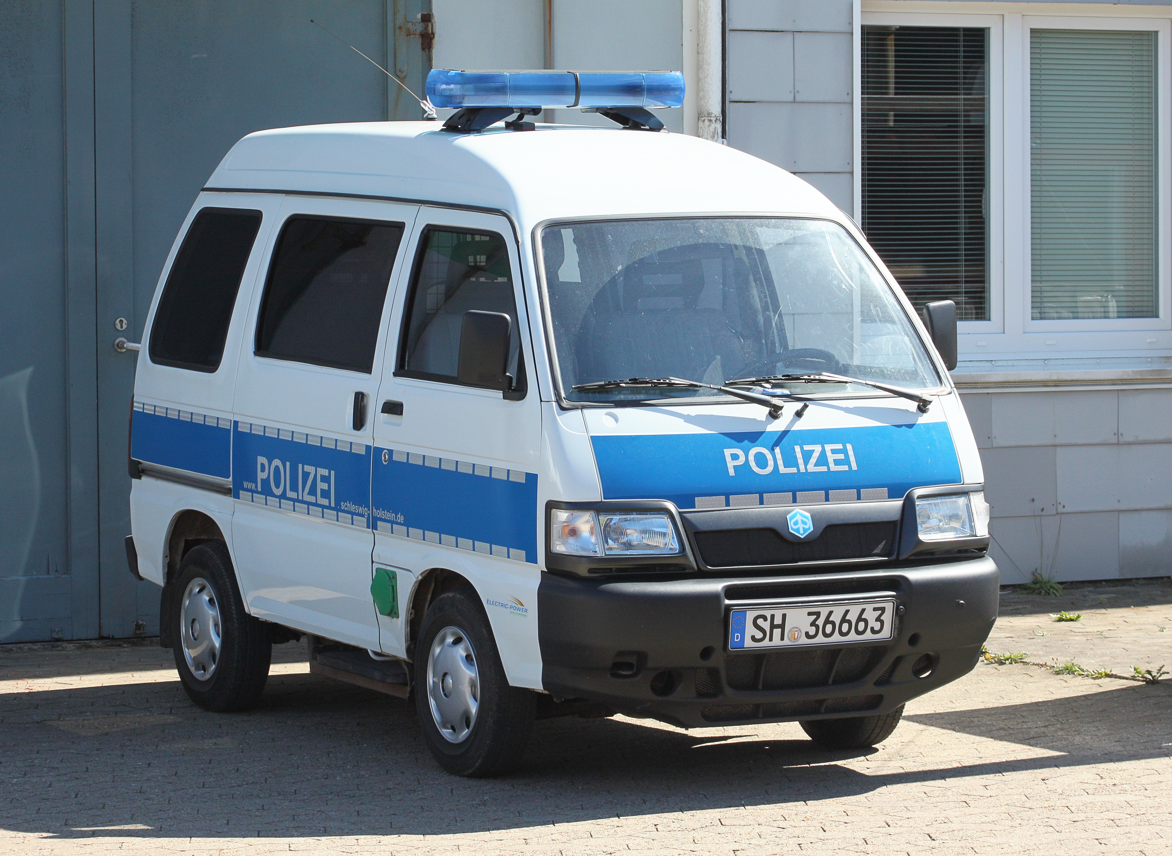 Helgoland - Einsatzfahrzeug der Polizei Schleswig-Holstein